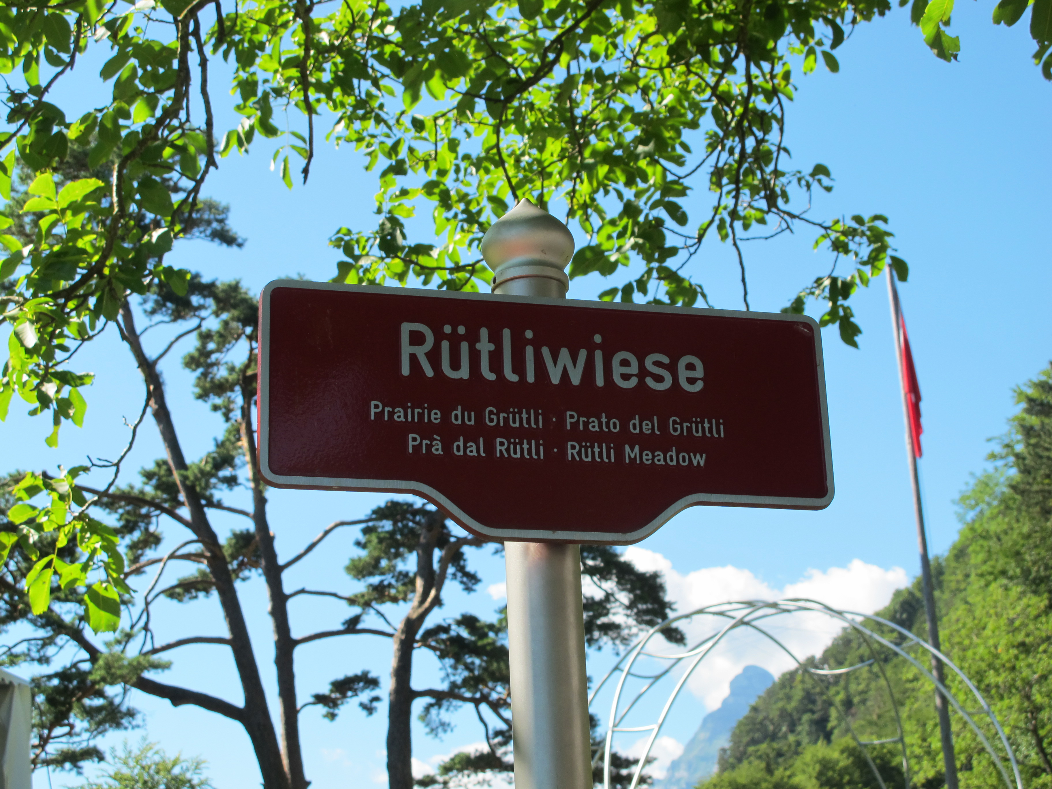 Das Ortsschild bei der Rütliwiese in den vier Landessprachen der Schweiz (Deutsch, Französisch, Italienisch, Rätoromanisch), sowie in englischer Sprache.